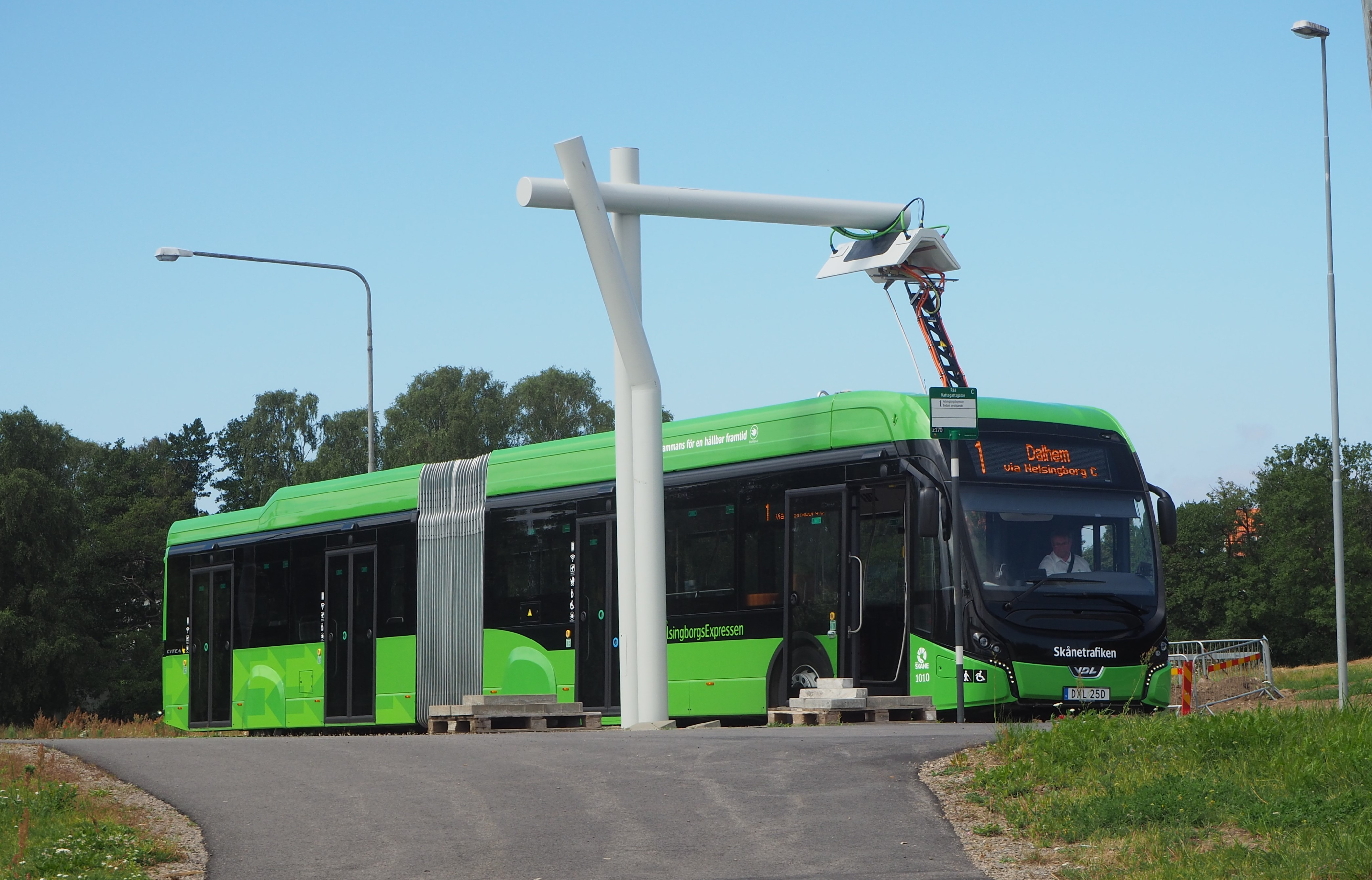 Den nya HelsingborgsExpressen som går mellan Råå och Dalhem. Trafiken utförs av 13 stycken eldrivna BRT-bussar från VDL.